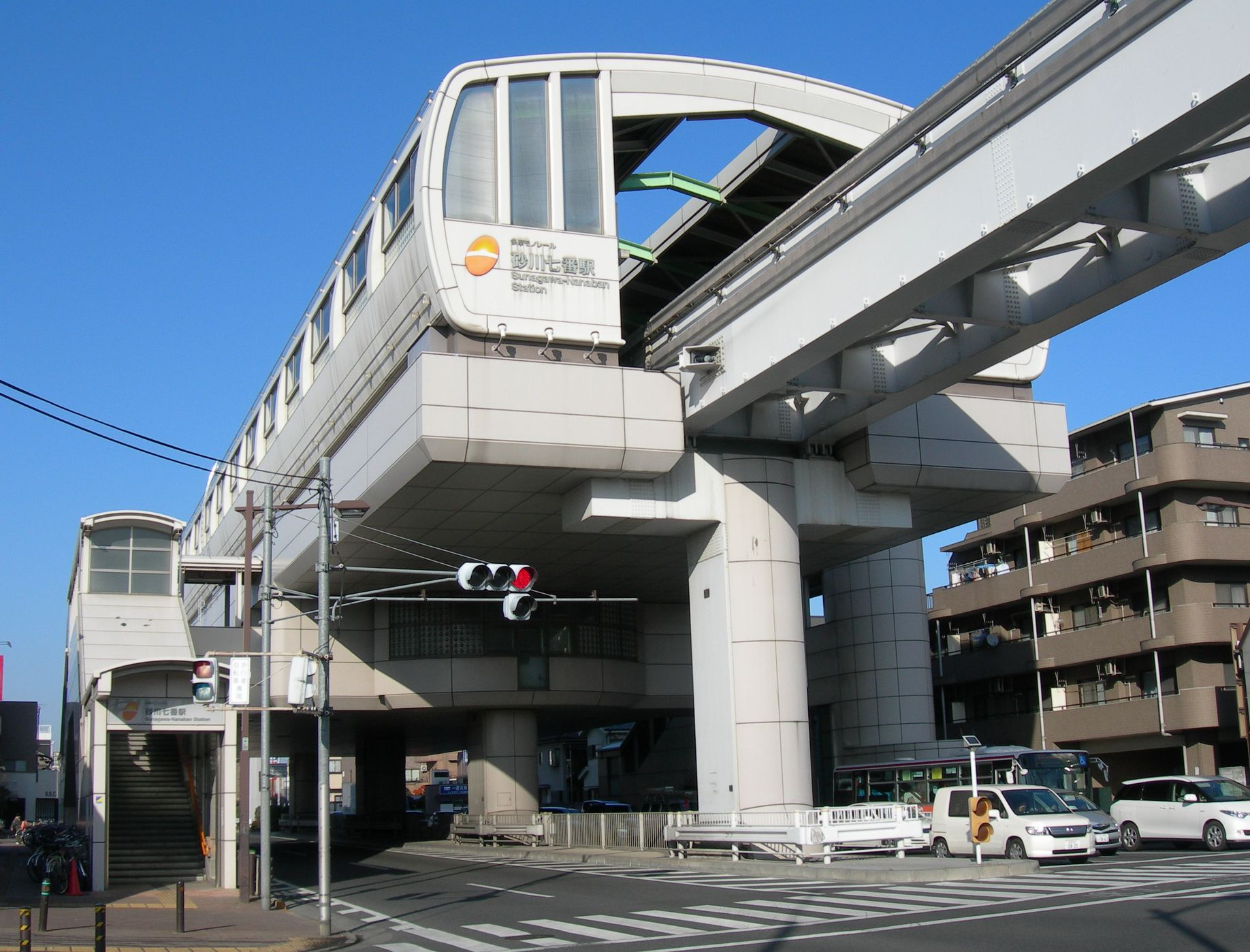 砂川七番駅